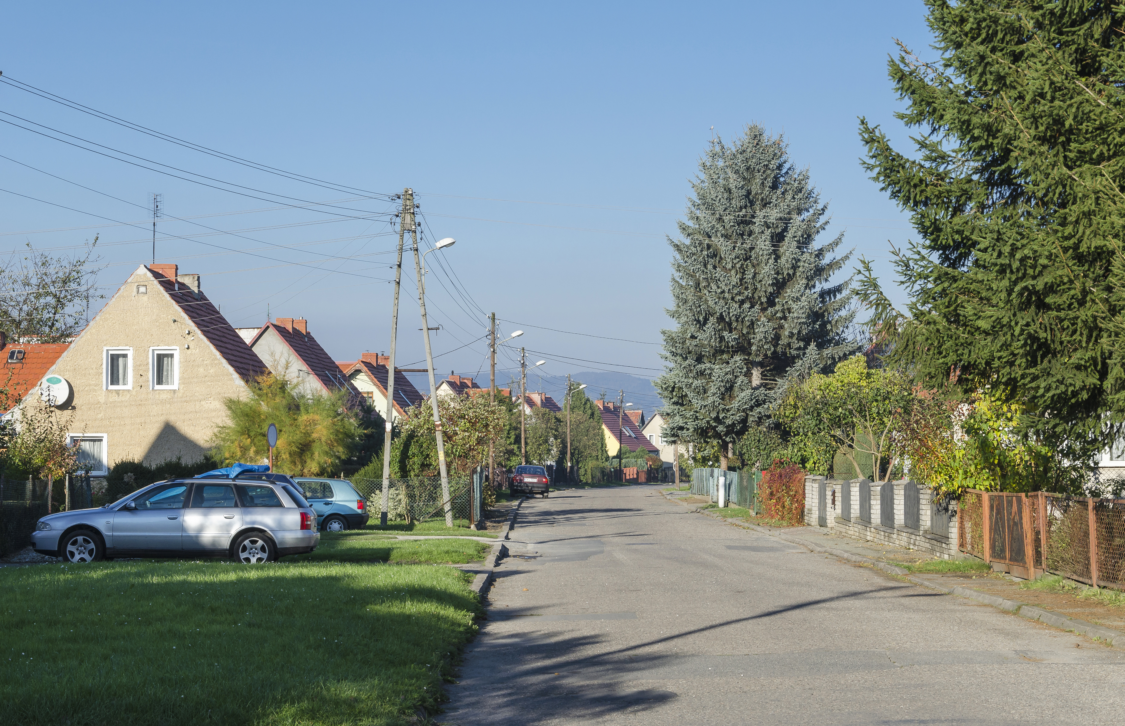 Kłodzko, ul. Kromera